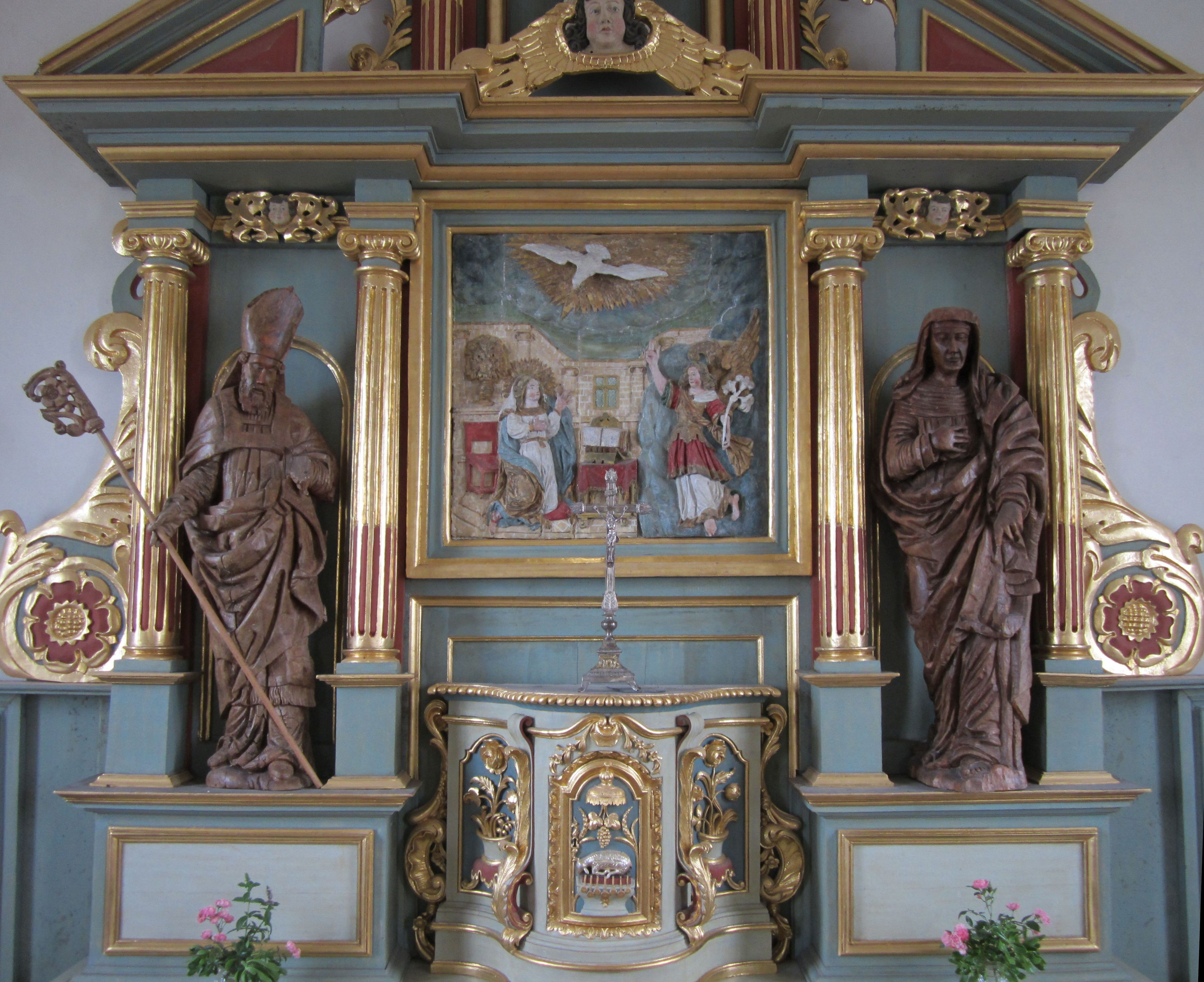 Angoville-en-Saire, commune associé de Cosqueville, Manche